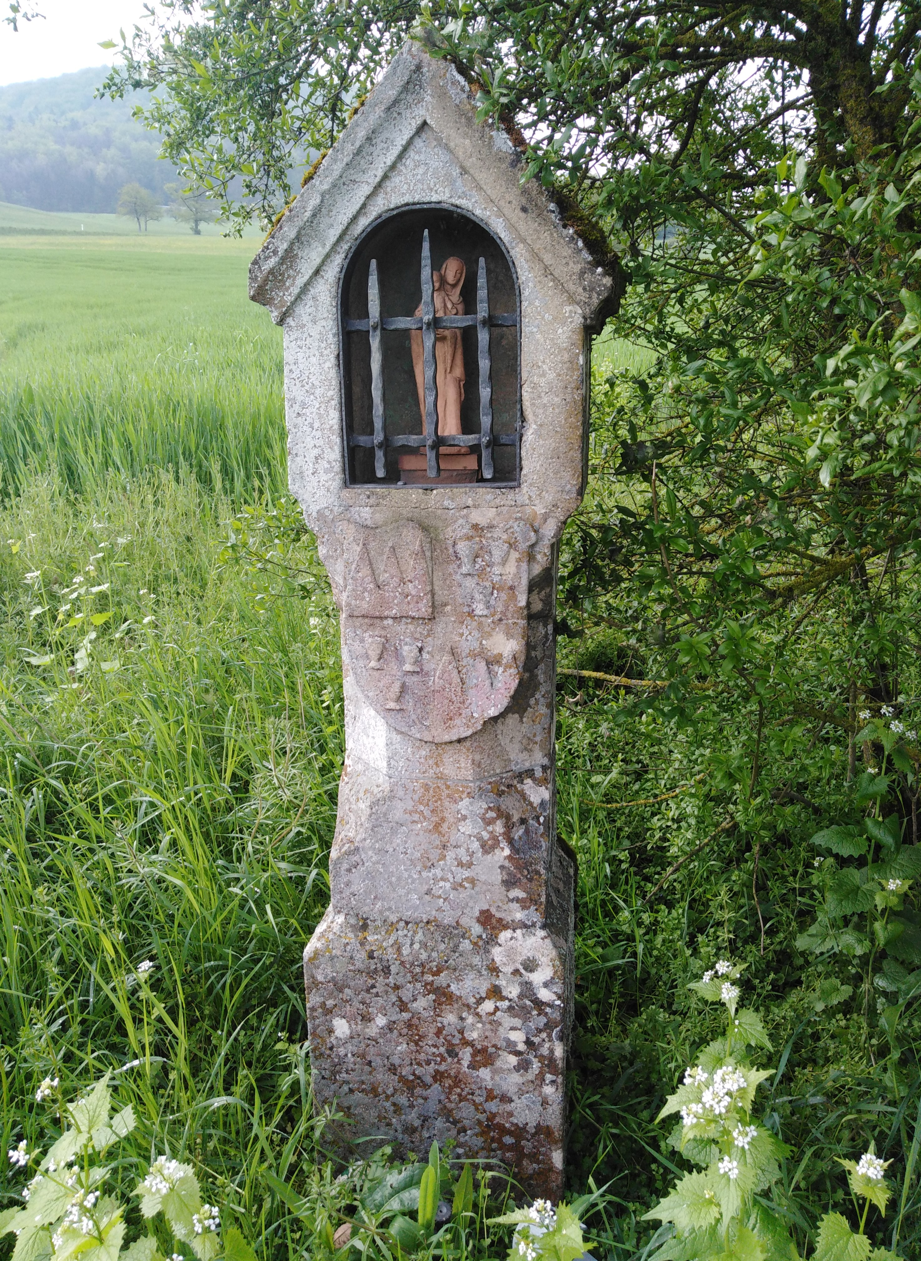 Lauchringen, Gemeinde im Landkreis Waldshut in Baden Württemberg. Gemarkung Oberlauchringen: Bildstock bei der Römerstraße.